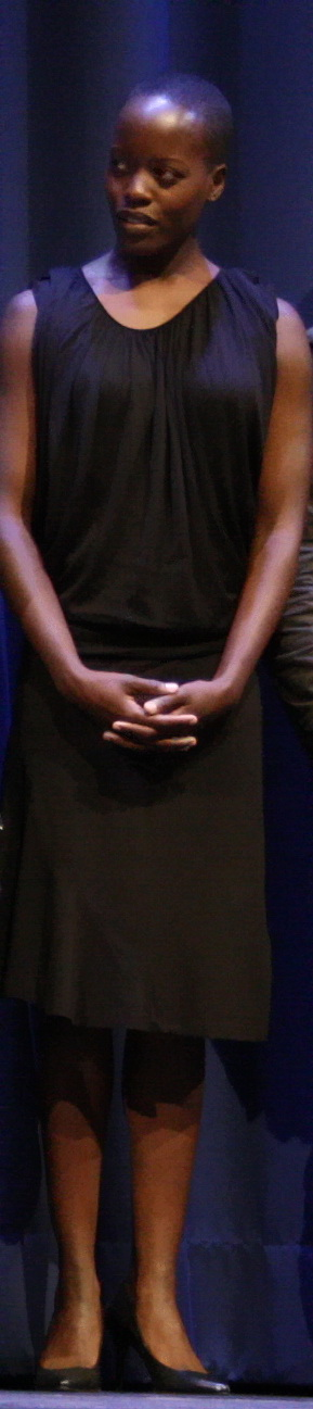 Florence Kasumba beim Filmfestival in München 2010. Premjere des Films Kongo.